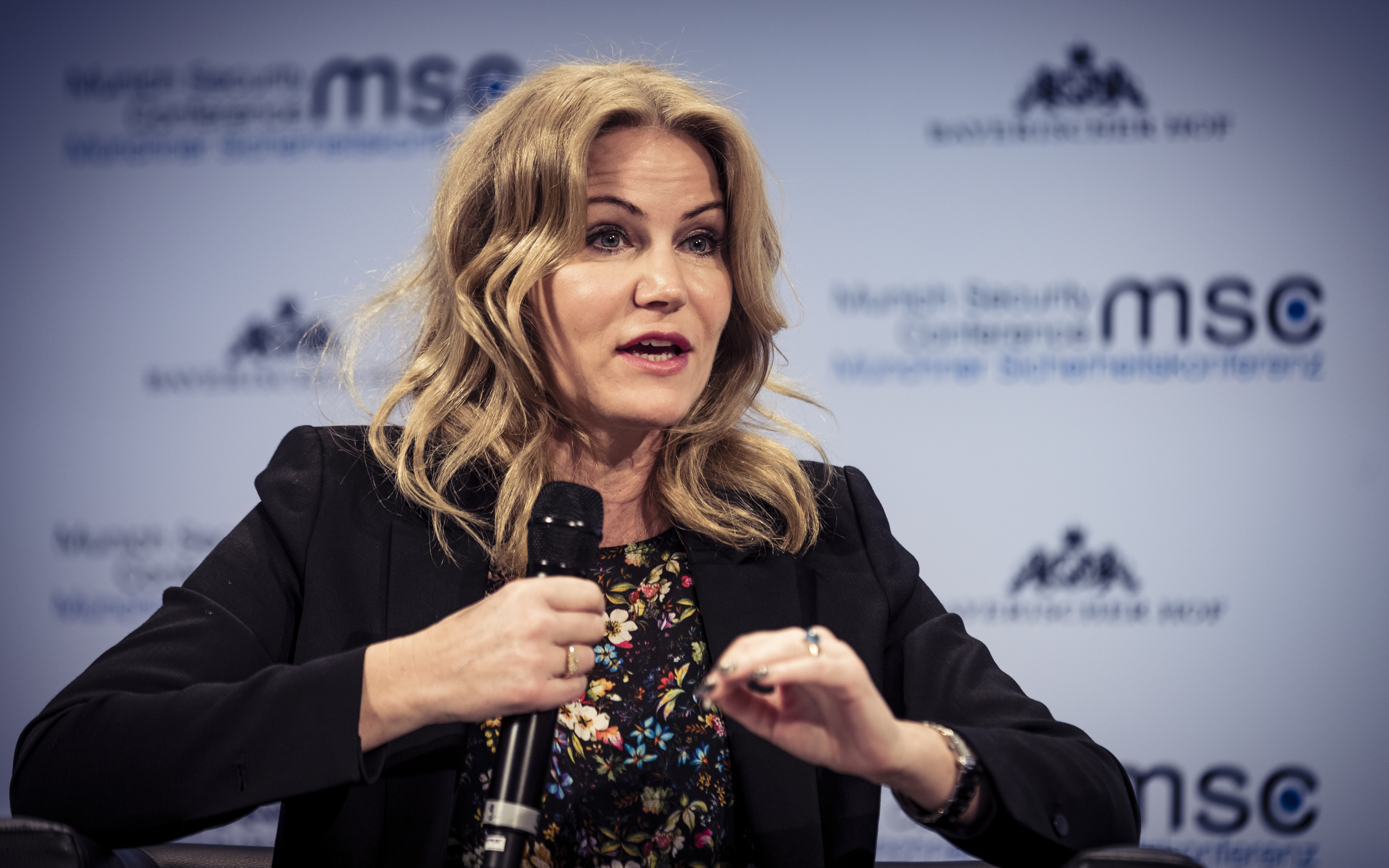 Helle Thorning-Schmidt während der Münchener Sicherheitskonferenz 2019